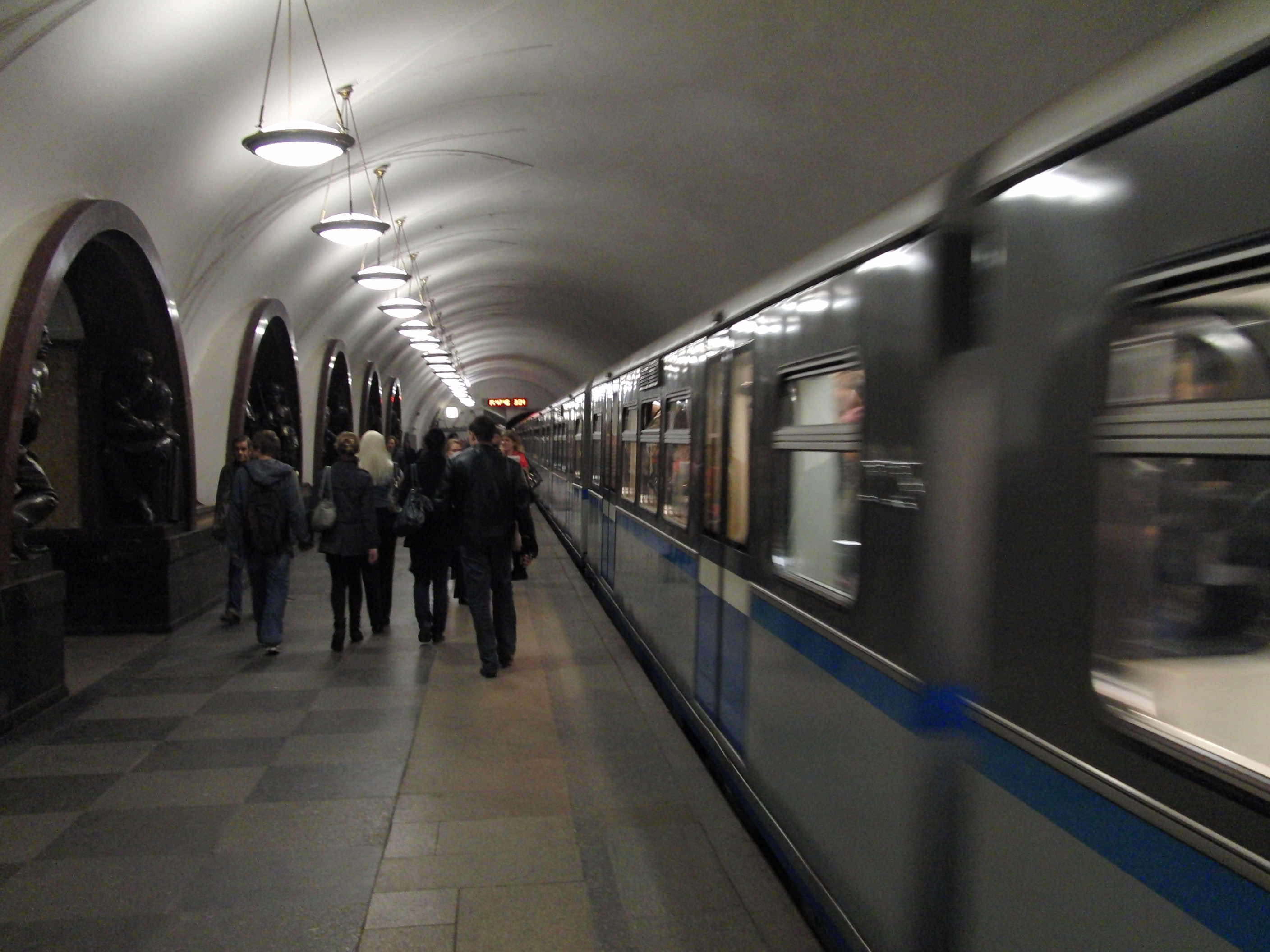 Ploshchad Revolyutsii (Площадь Революции)